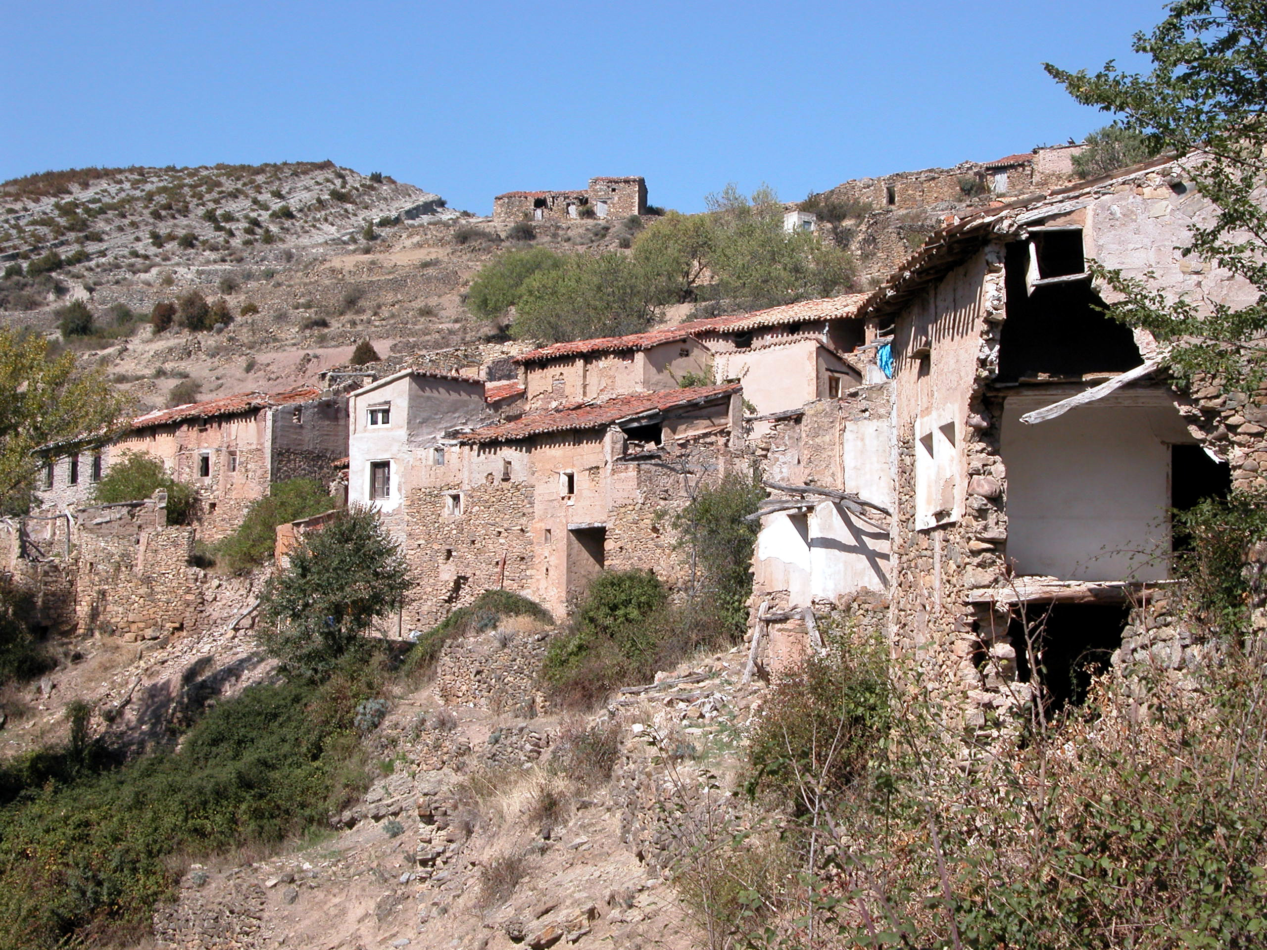 San Martín, aldea de Santa Engracia del Jubera en La Rioja, España.